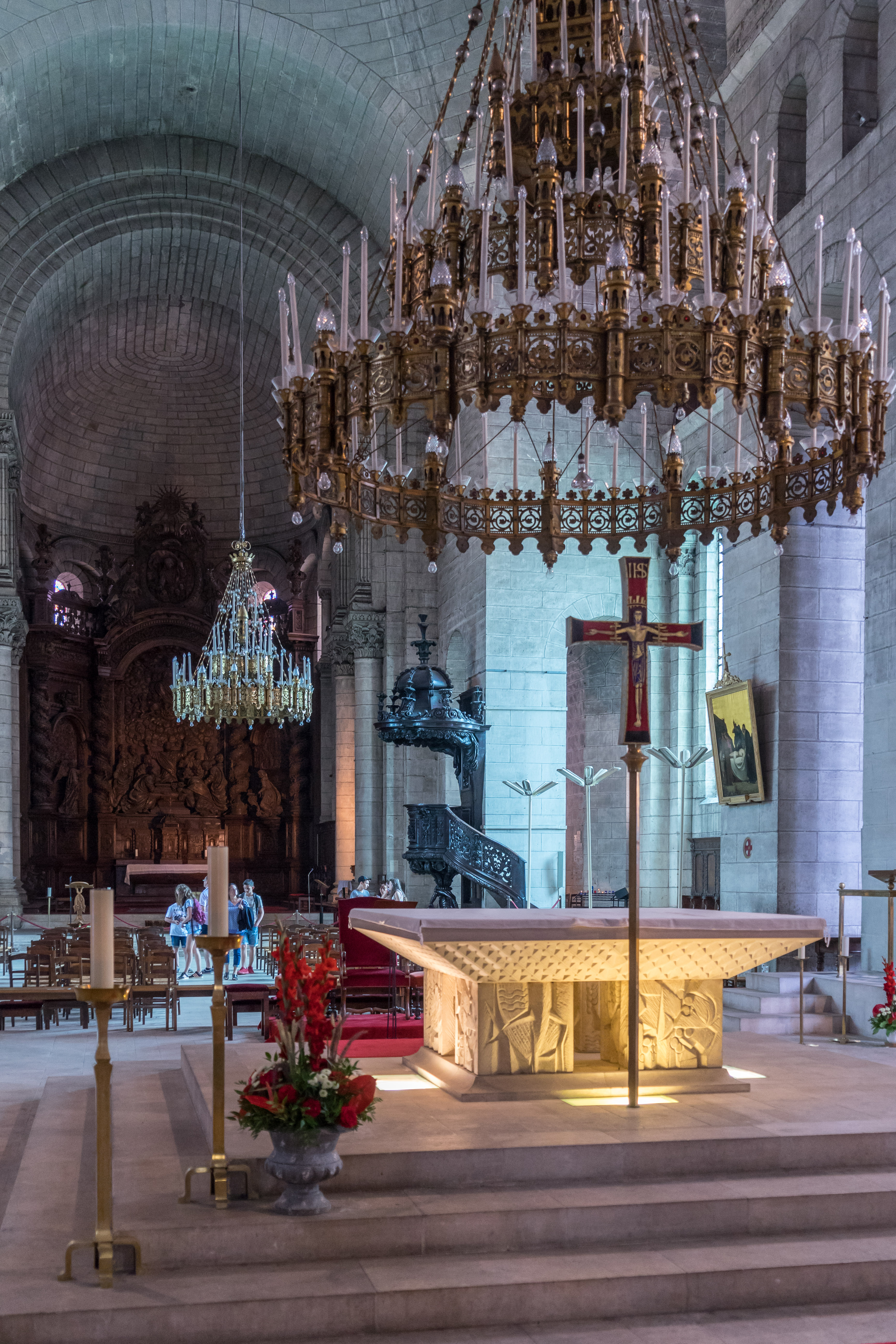 Périgueux - Saint-Front - Choeur